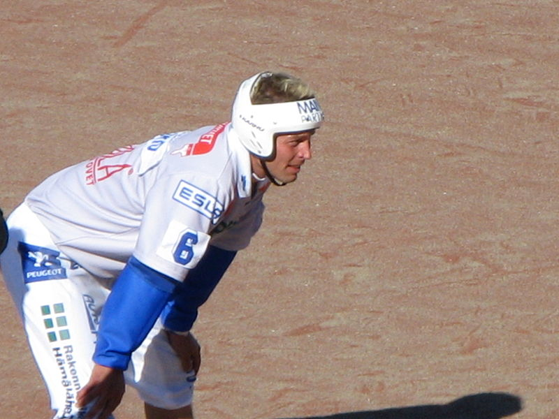 Description